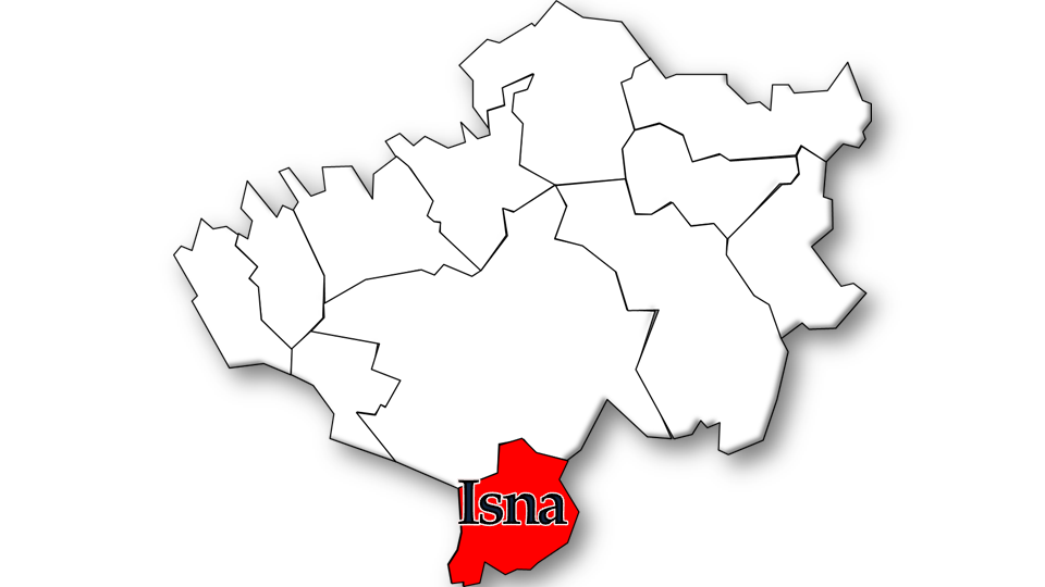 População